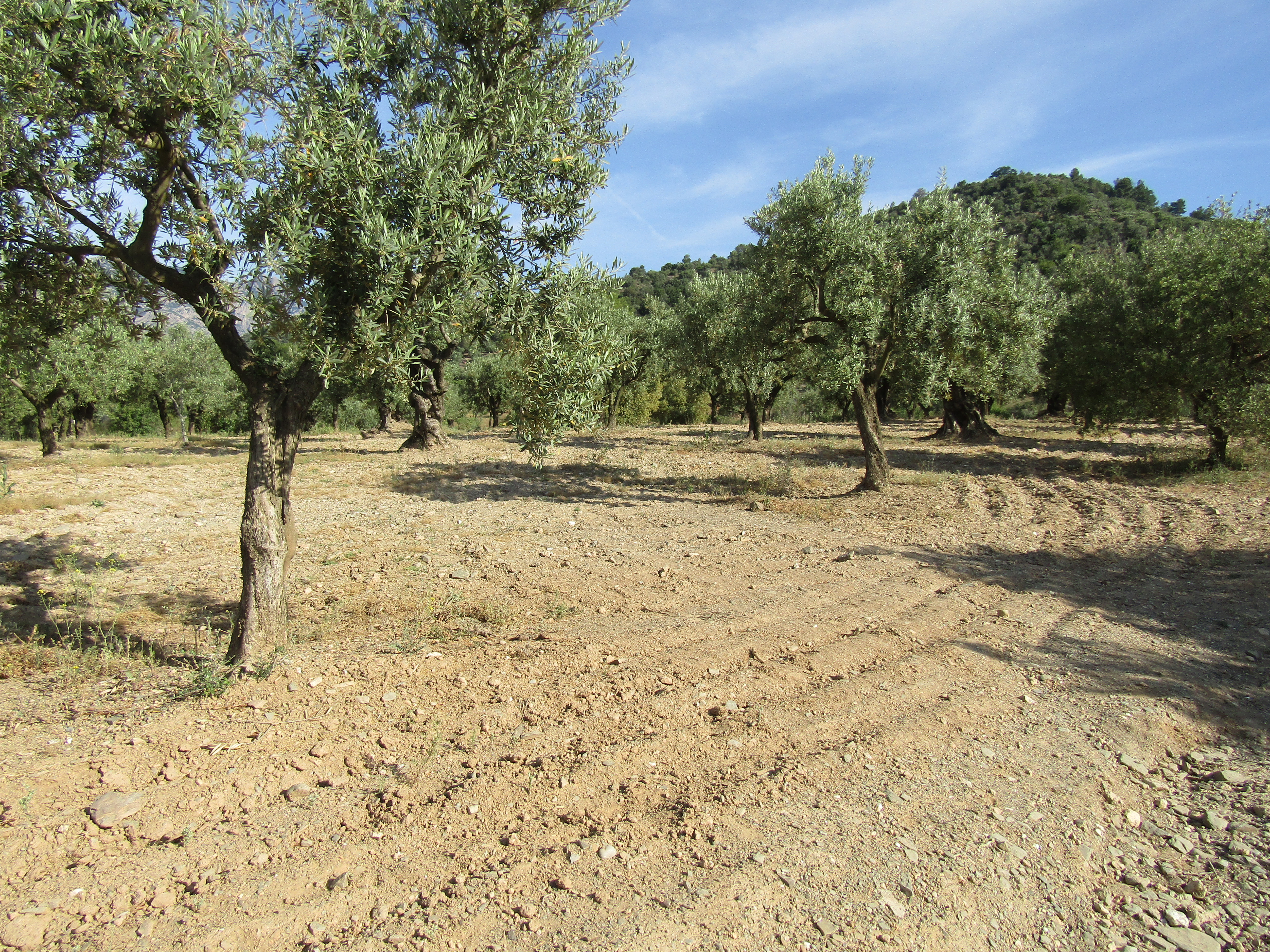 Cultius al llarg del camí de Can Llimona a Olesa de Montserrat (Barcelona).